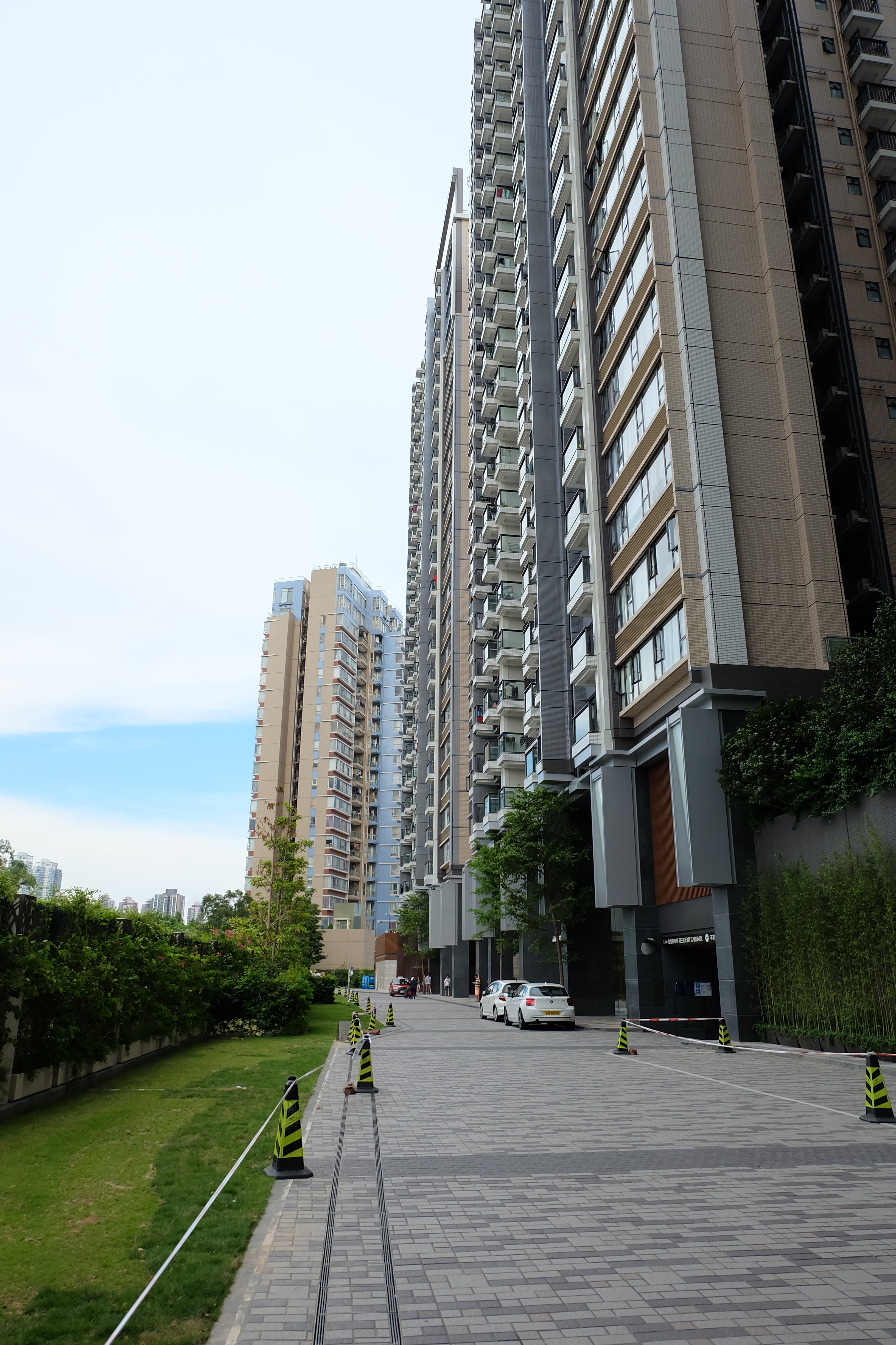 溱柏屋苑內之行車路